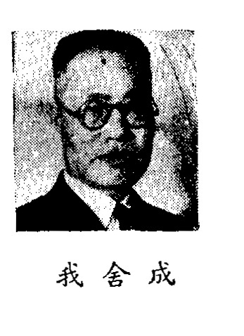 中文（中国大陆）: 制憲國民大會代表